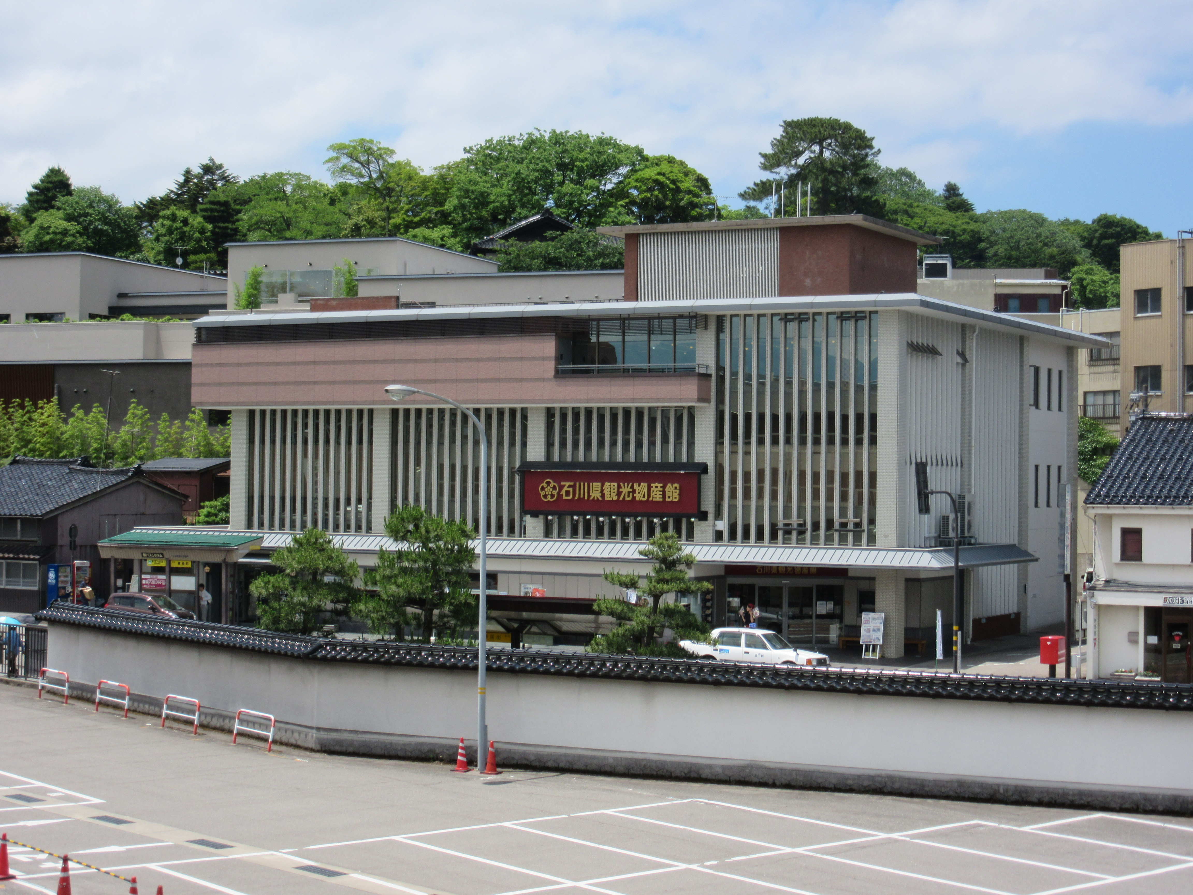 石川県観光物産館